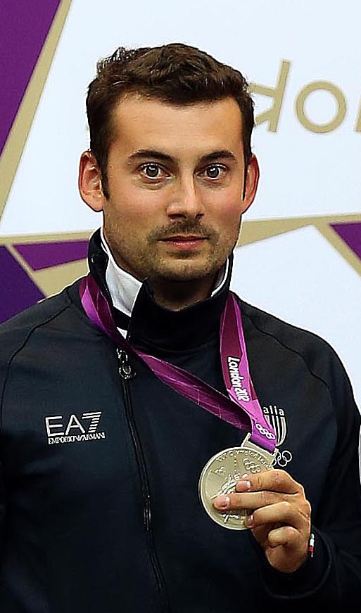 Luca Tesconi